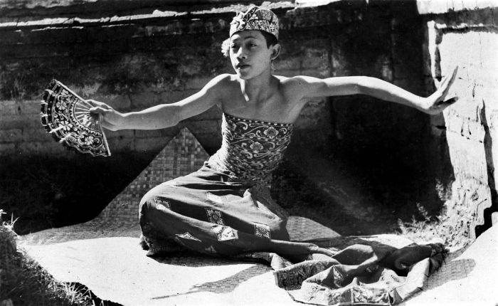 Repronegatief. De beroemde Balinese danser I Mario